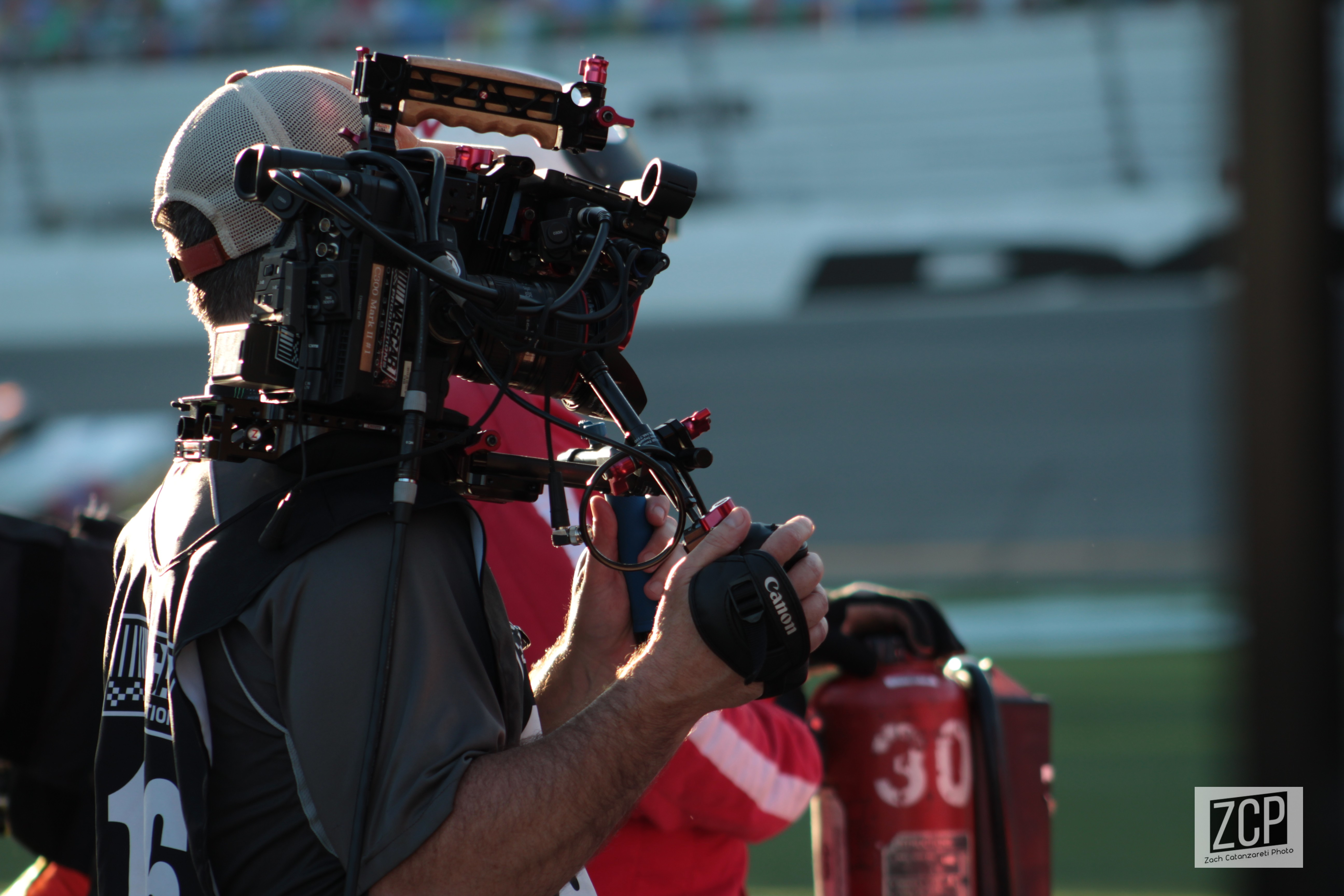 2018 Daytona 500